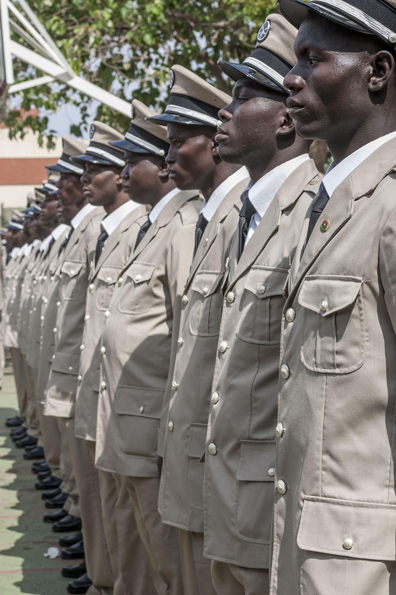 Jeunes officiers de l'École des douanes de Ouagadougou lors de la remise des insignes marquant la fin de leur formation. This is an image of "African people at work" from Burkina Faso